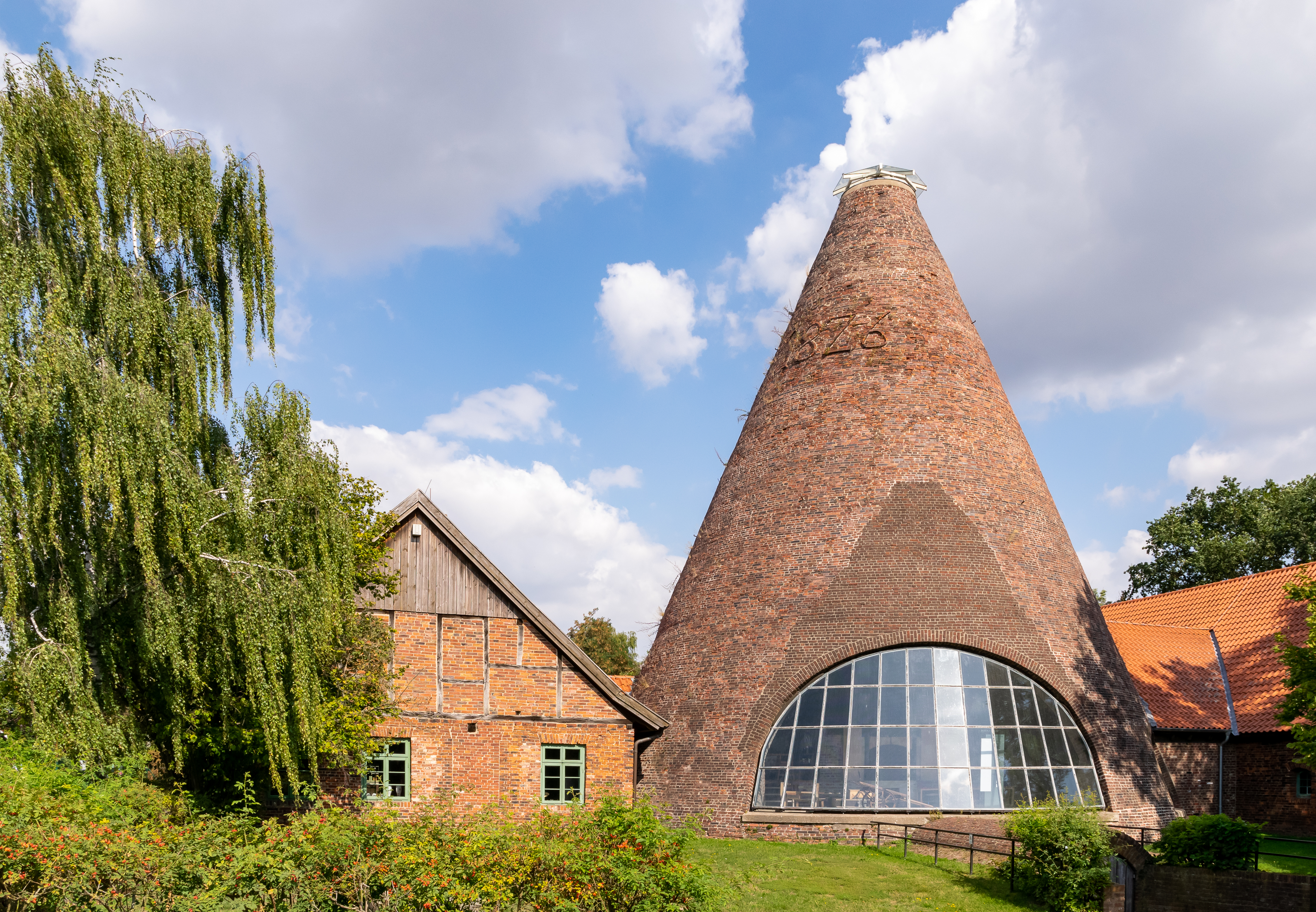 Ehemalige Glashütte Gernheim bei Petershagen, heute LWL-Industriemuseum; Glashüttenturm